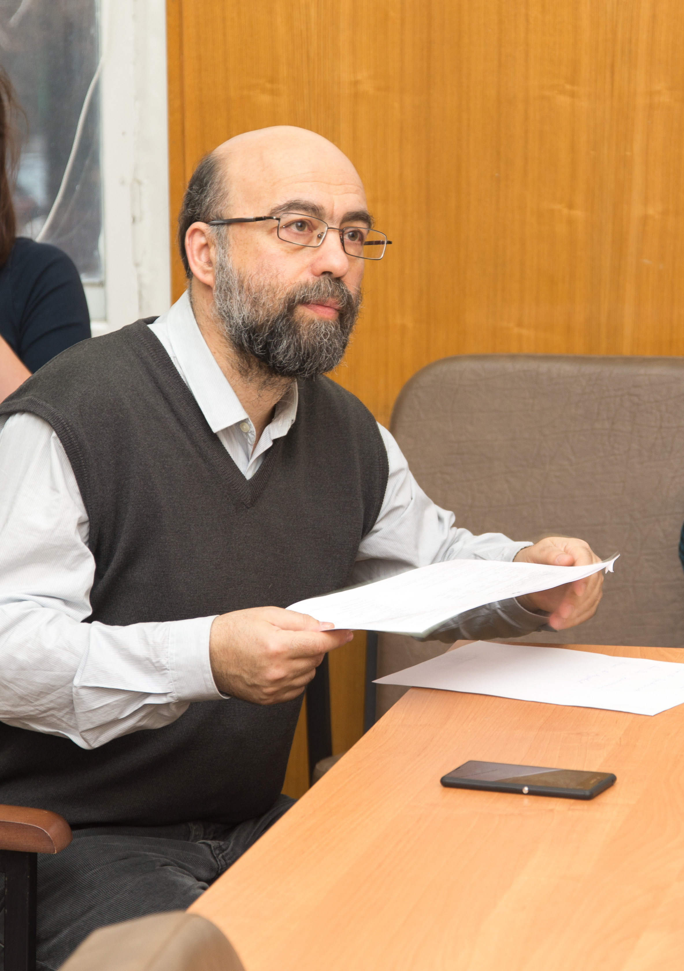 В. А. Плунгян на II Воркшопе по бесермяноведению и мордвинистике.